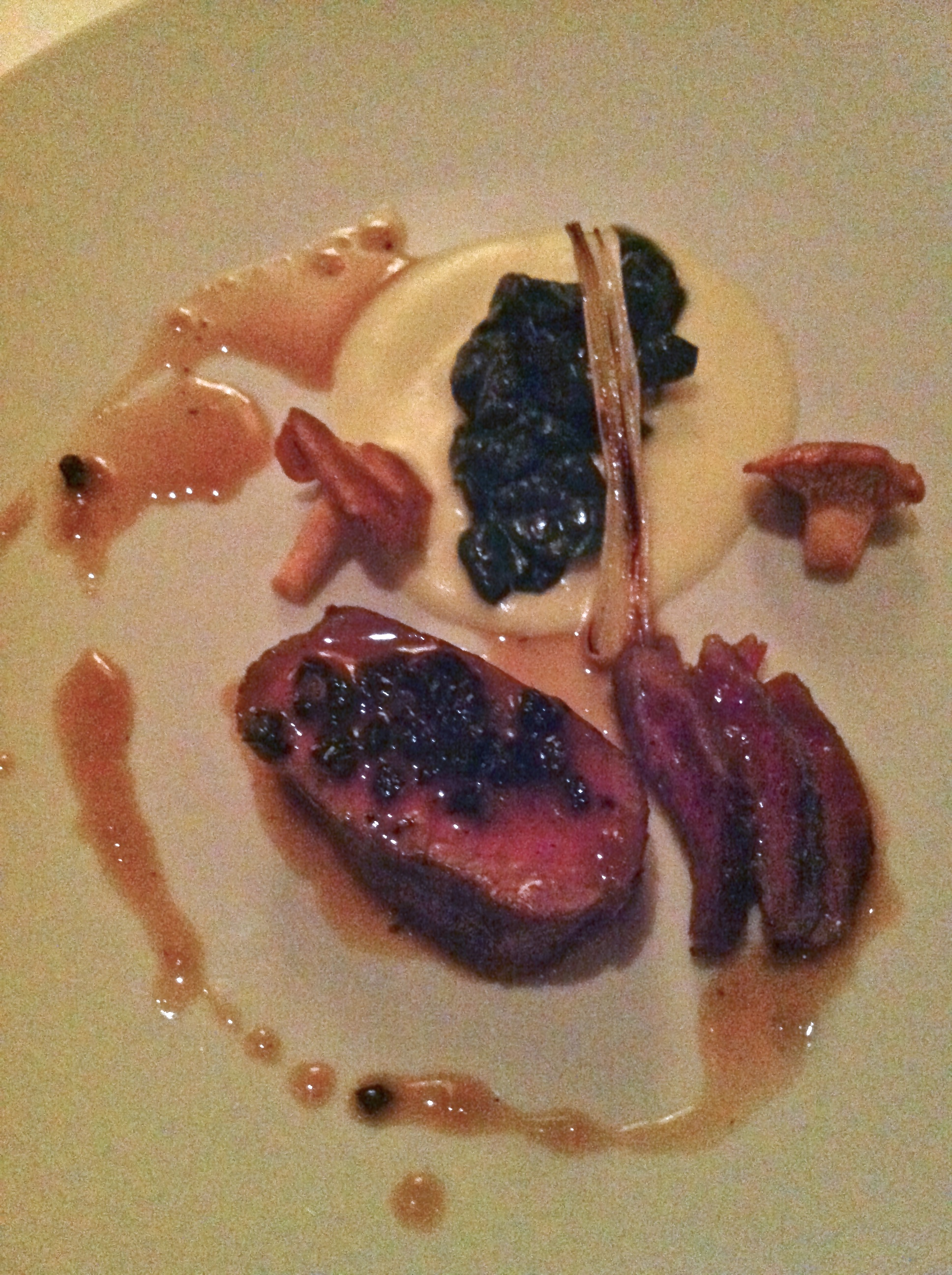 Côte de bœuf, jeune oignon et pomme de terre fumée à la sauce périgueux